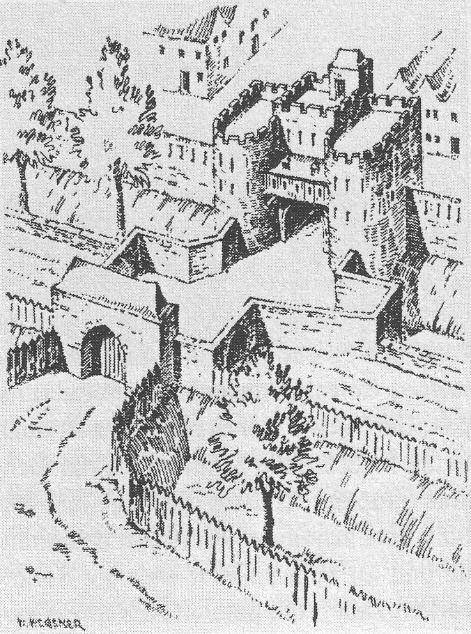 Feldseite der Eigelsteintorburg, 16. Jahrhundert. Zeichnung von W. Wegener (um 1920?) nach dem Mercator-Plan von 1571